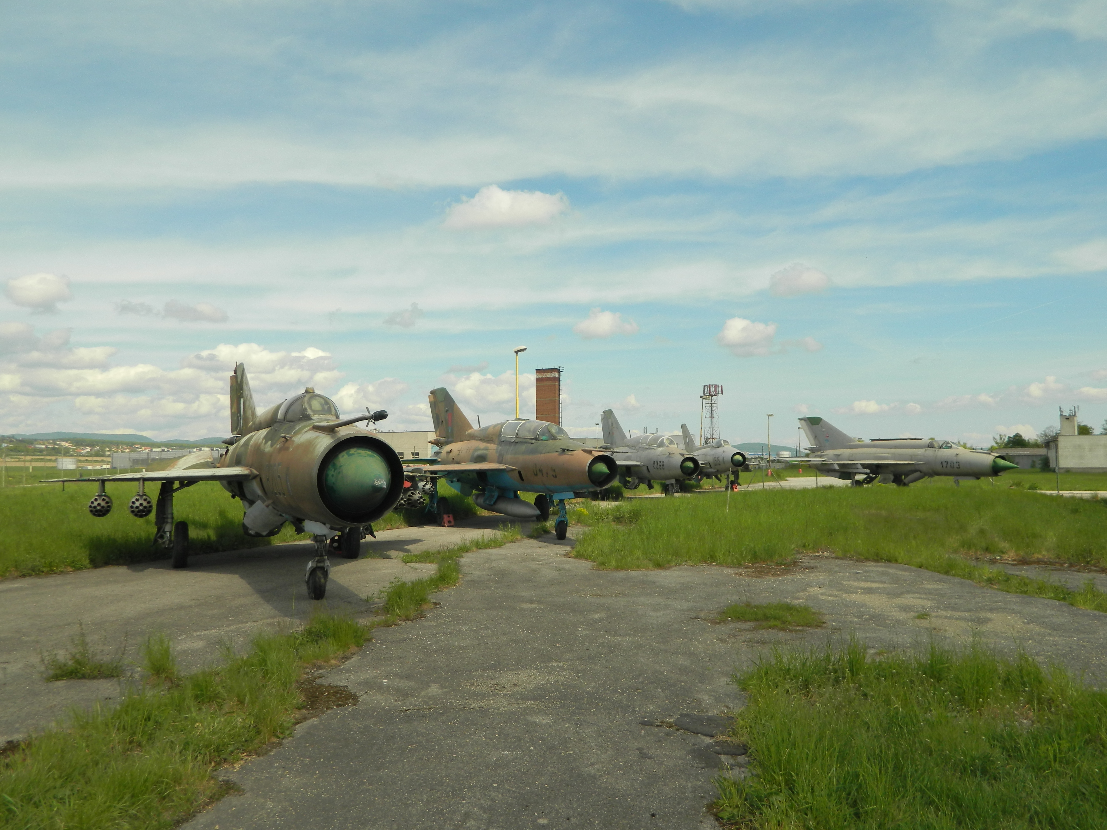 MIG leteckych sil SR v STM - ML KE